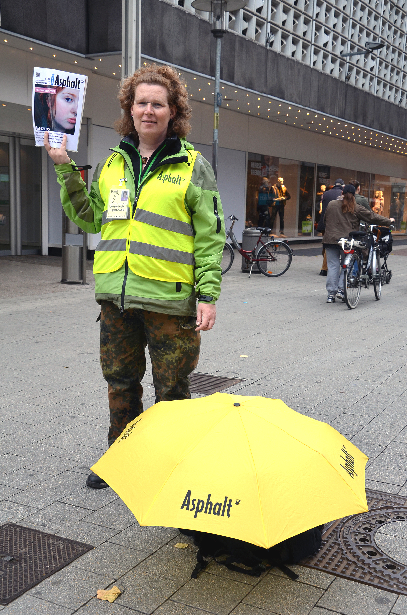 Asphalt-Magazin-Verkäuferin Valerie in Hannover an ihrem Standort zwischen Osterstraße und Große Packhofstraße, hier mit dem Ausweis mit der laufenden Nummer 2111 und den Hinweis auf das Kaufhaus 'Schuh-Neumann ...